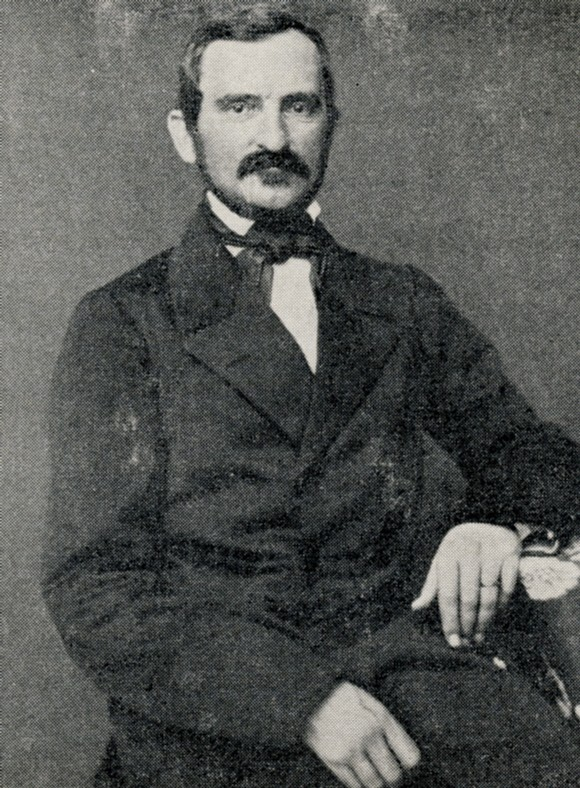 Vattenbyggaren F. W. Leijonacker, Stockholm 1860-tal